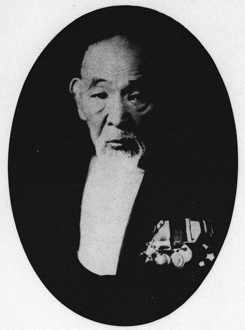 二代目本間金之助（1845～1929）